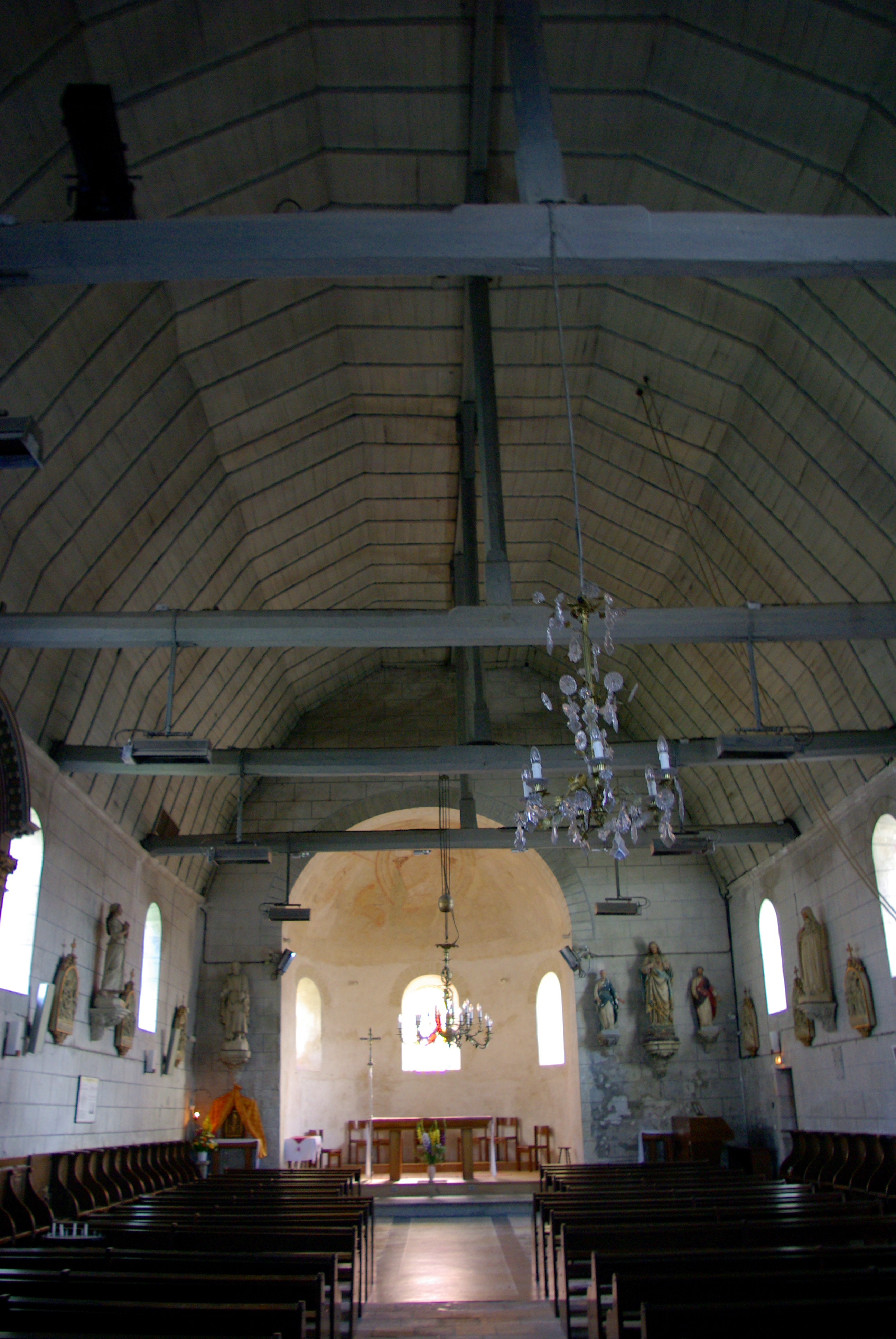 Église Saint-Pierre de Parçay-Meslay. This building is en partie classé, en partie inscrit au titre des Monuments Historiques. .